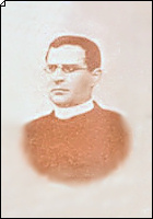 Vincenzo Padula (1819 – 1893)